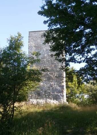 Sewekenwarte